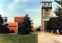 Grube Emil Mayrisch, Aldenhoven-Siersdorf